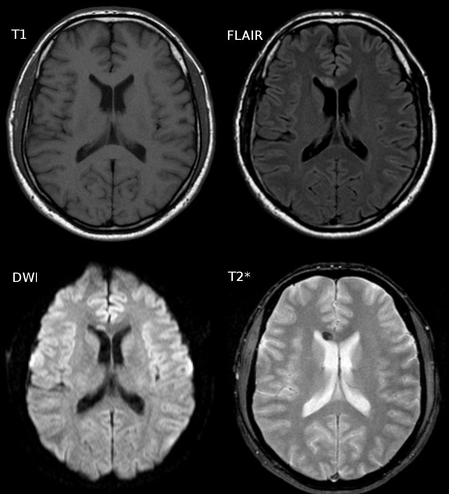 Diffuses axonales Schertrauma bei Motorradunfall. Kontrolle in der MRT nach 3 Tagen: Man erkennt die aus der CCT bekannte kleine balkennahe Blutung in der T1w schon nicht mehr. Gut zu sehen allerdings in FLAIR, DWI und am besten in der T2* (Haem).